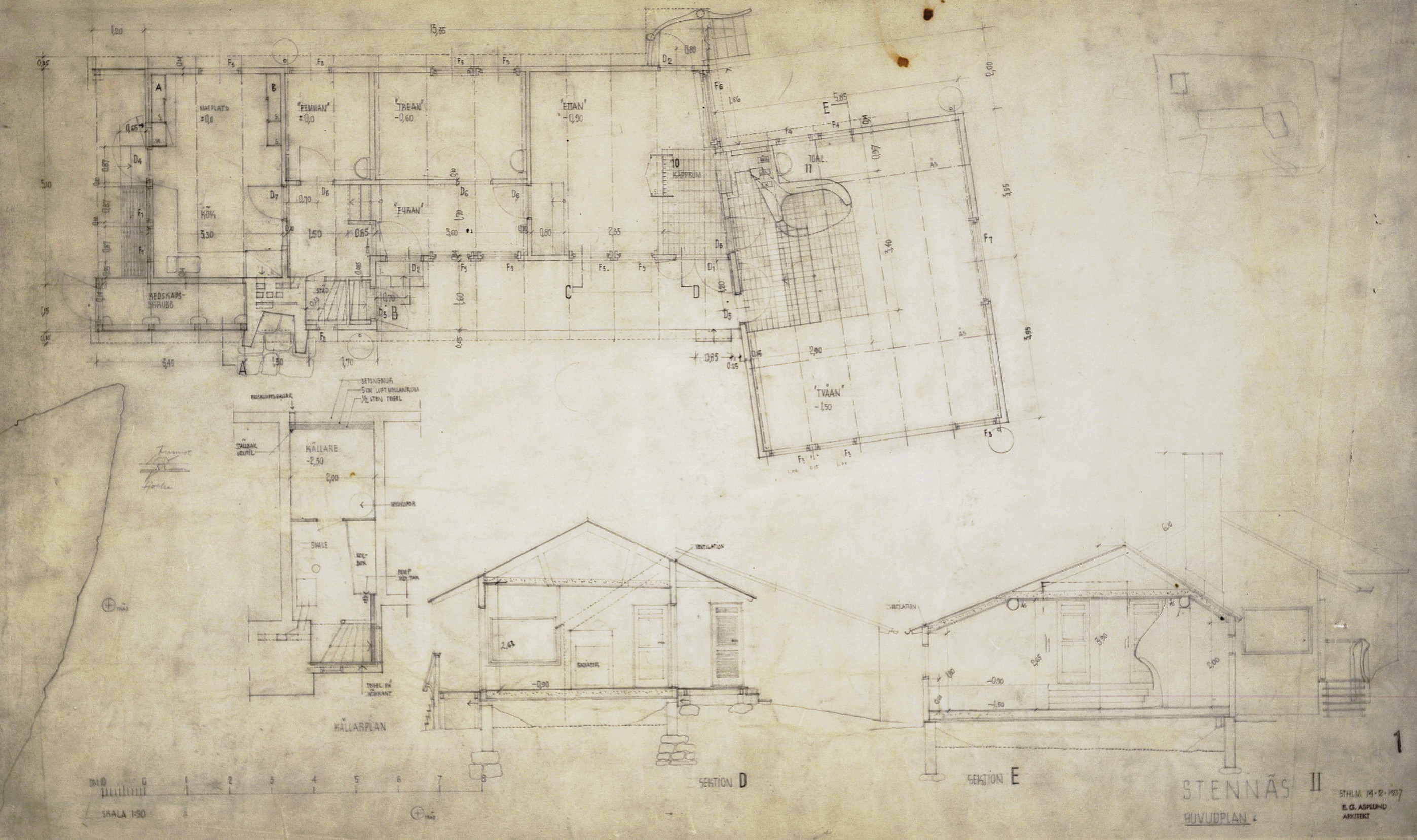 Planritning till sommarhuset Stennäs, arkitekt Gunnar Asplund